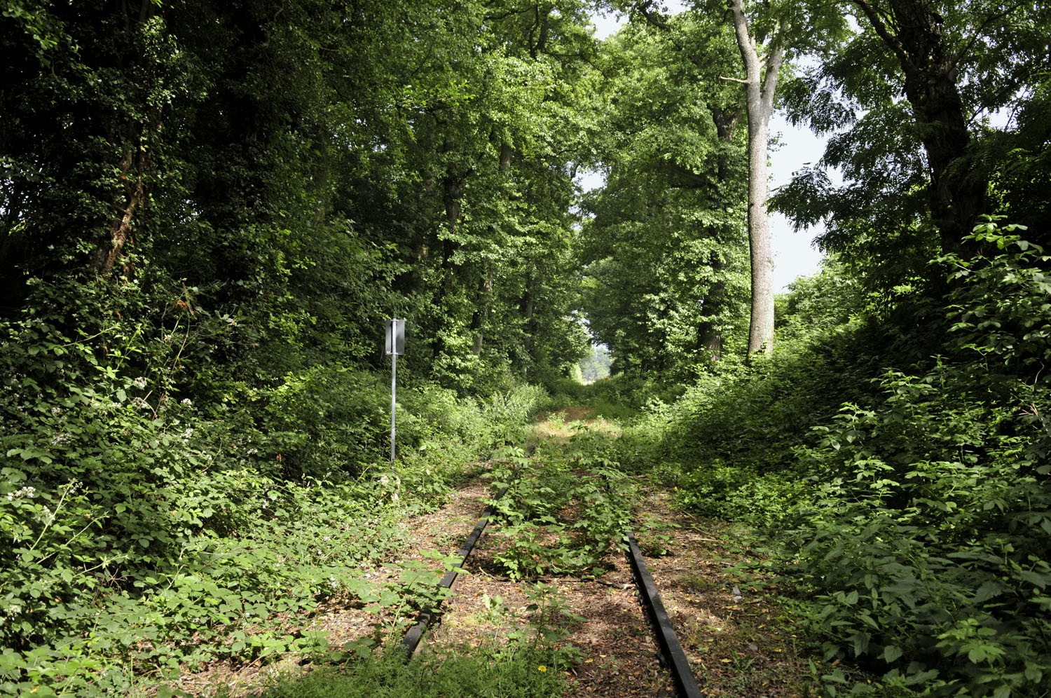 TWE-Strecke bei Bad Iburg-Glane, seit Sperrung der Teutoburger Wald-Eisenbahn im September 2011 ergreift die Natur Besitz von den unbefahrenen Gleisen